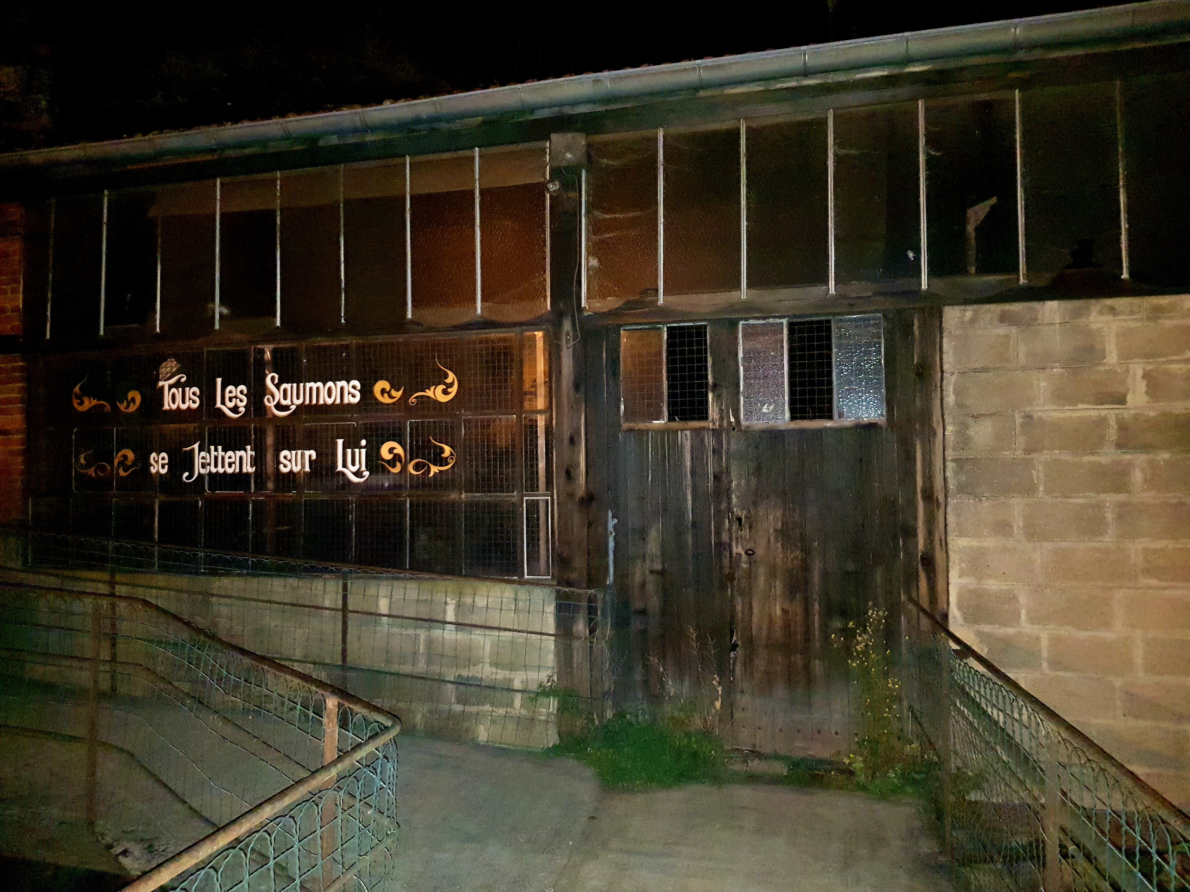 Forges Mondière